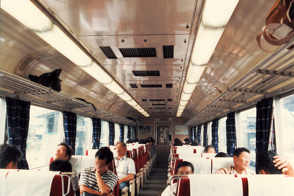 名古屋鉄道 キハ8000系 8052車内